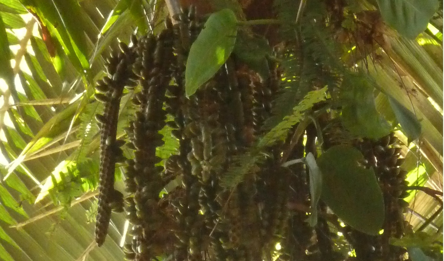 Detail fruits du Welfia regia (Costa-Rica La Selva )